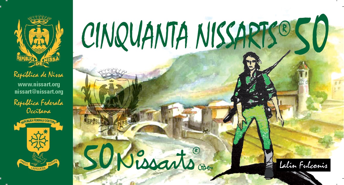 Bilhet de 50 "Nissarts" (moneda locala editada da la República de Nissa) emb l'efigia de l'eròi barbet nissart Lalin Fulconis.